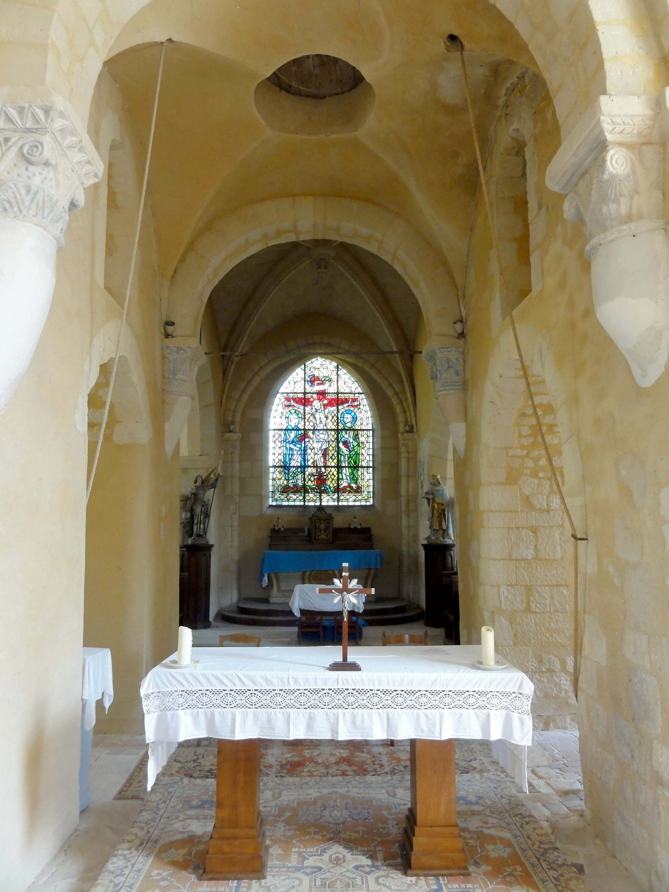 Intérieur de l'église (voir titre).